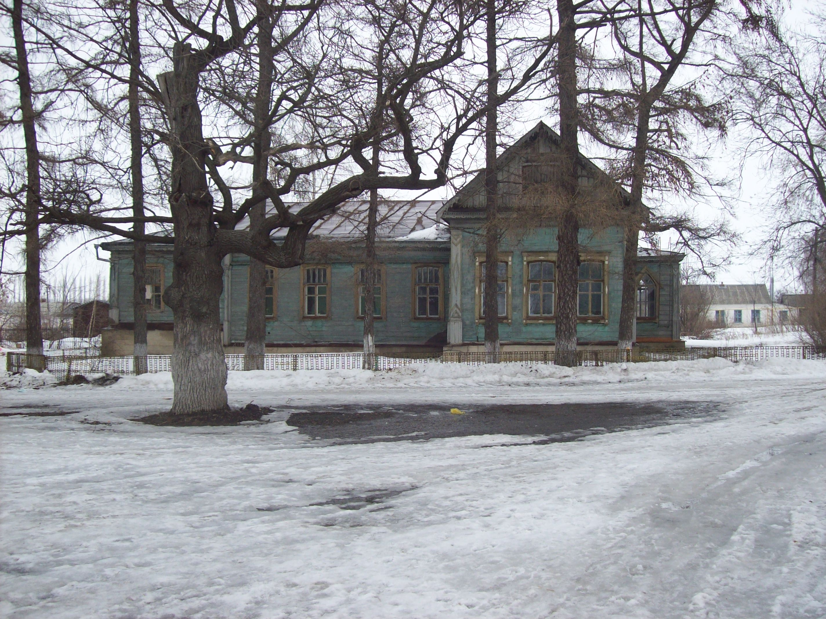 Воронежская область,Новоусманский район, с.Хлебное